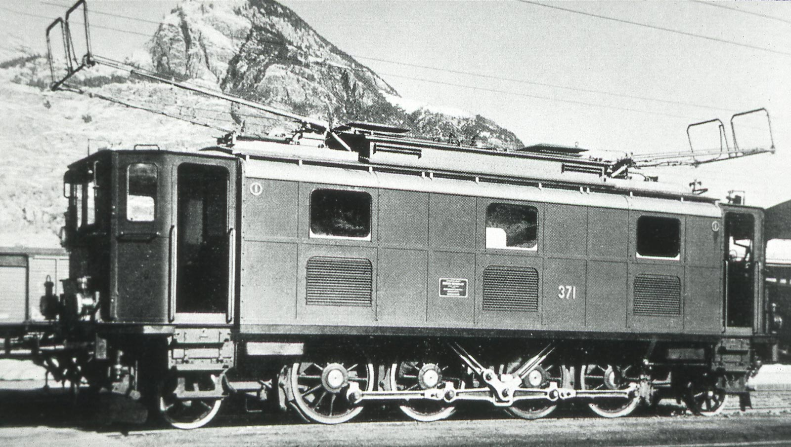 Drehstromlokomotive Fb 4/6 Nr. 371 nach der Ablieferung in Brig